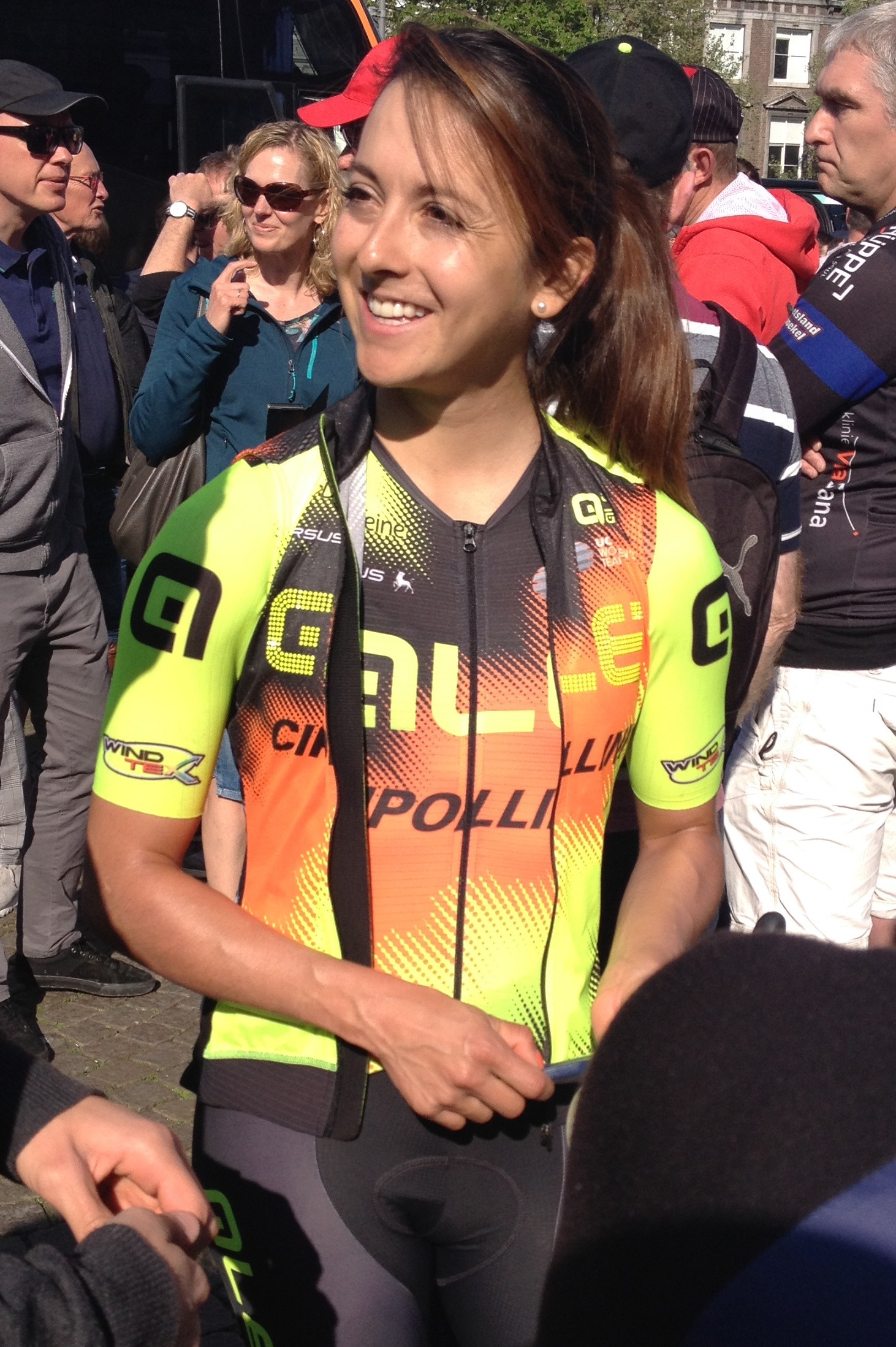 Start van de Amstel Gold Race Ladies Edition 2019 in Maastricht